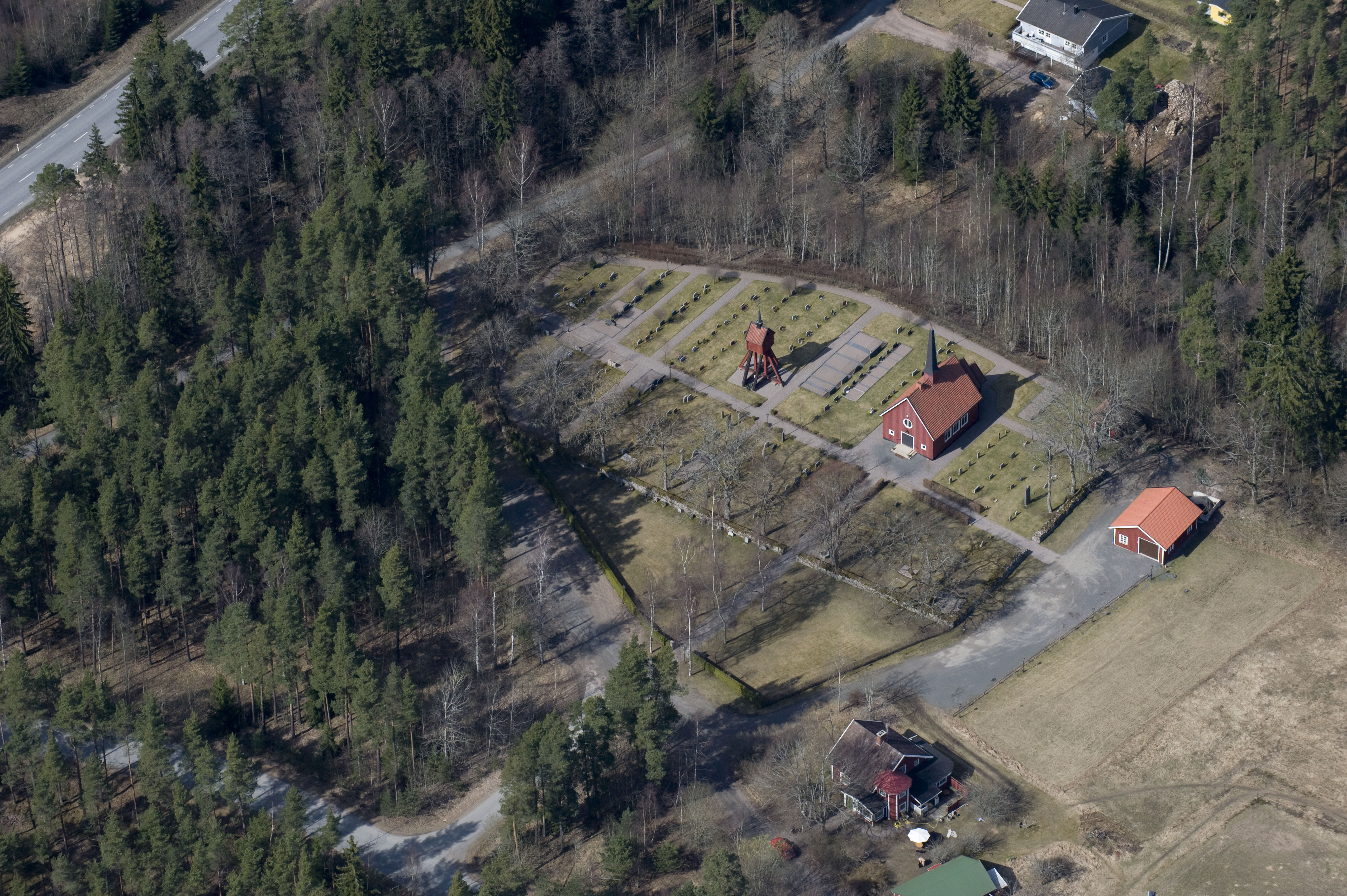 Fiskebäcks kapell från luften